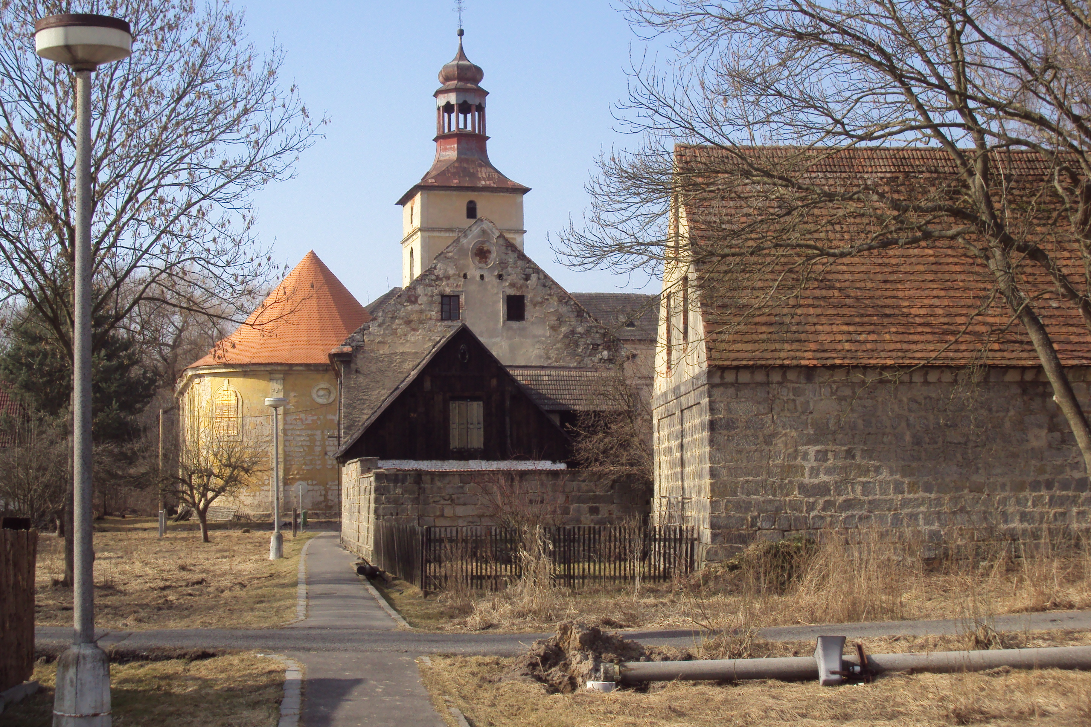 Kostel Všech svatých ve Stvolínkách